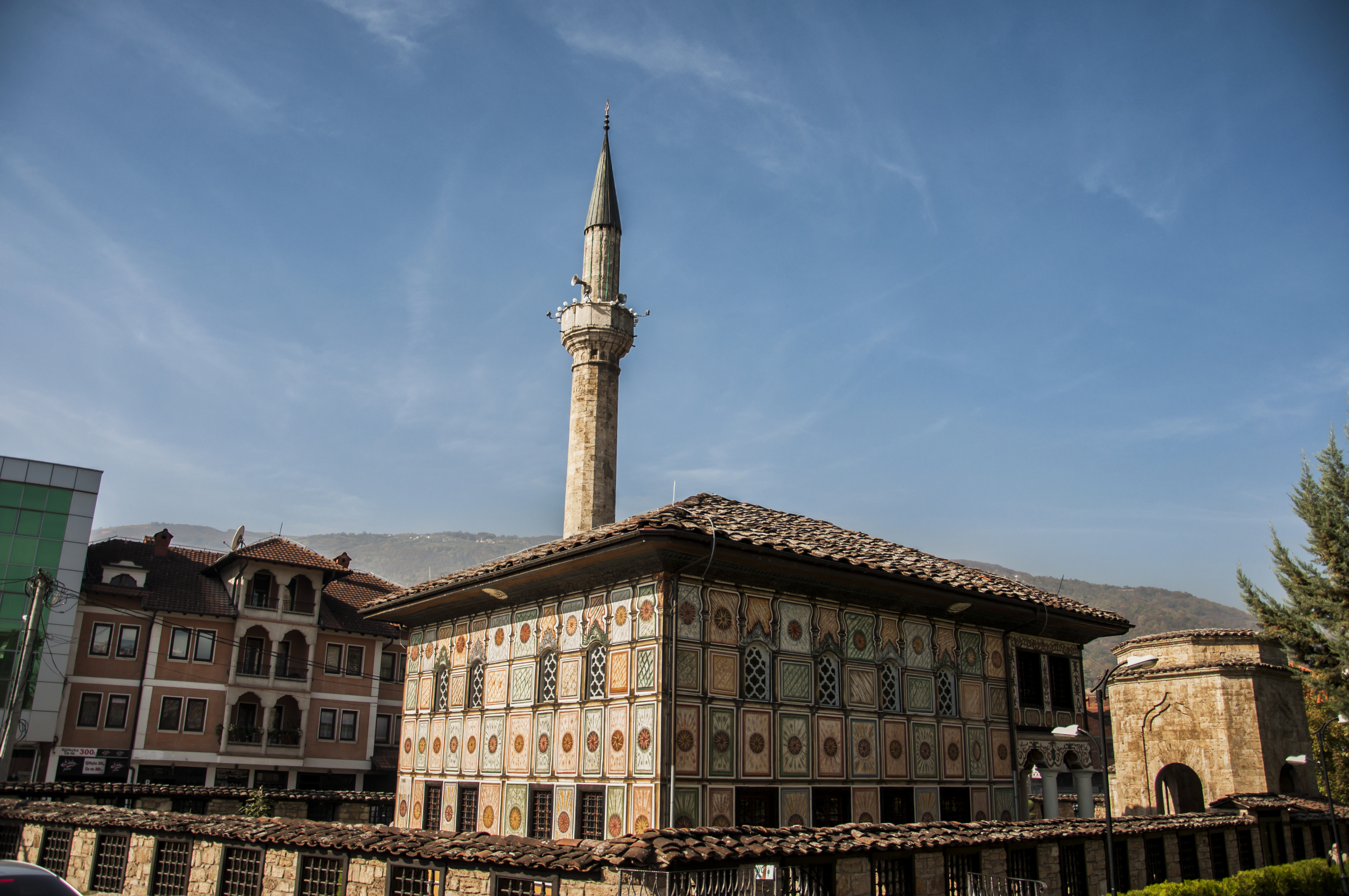 Шарената џамија во Тетово сликана преку ден странично позади